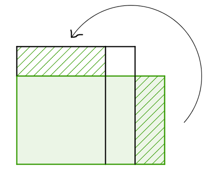 Illustration de la construction d'un carré d'aire égale à celle d'un rectangle donné selon une méthode décrite dans les Sulba-Sutras.